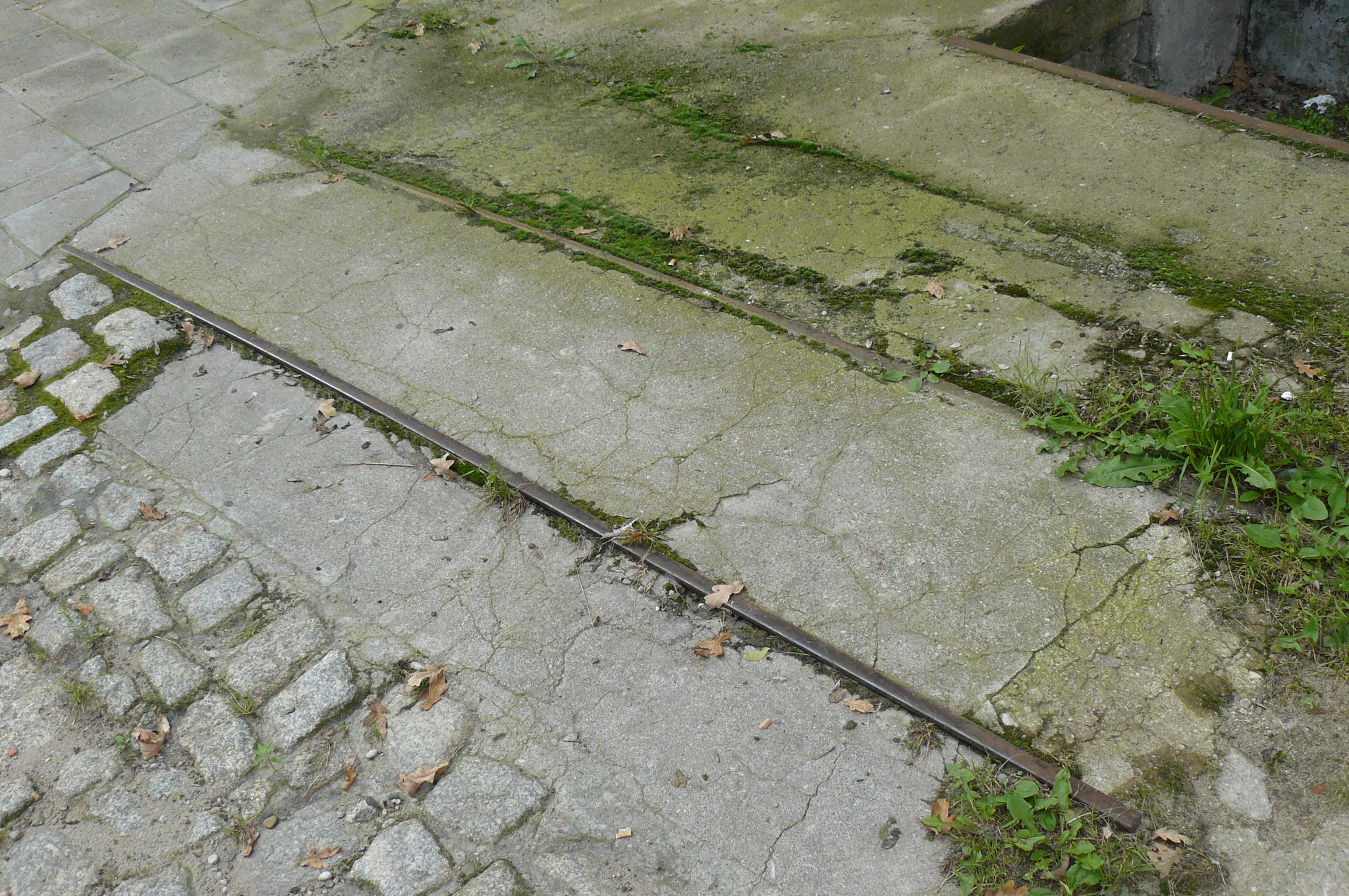 Młyn Dahlmanna w Obornikach (także Młyn Słonawy). Pozostałość kolei wąskotorowej (wewnętrznej).